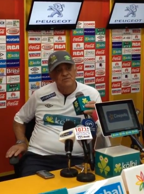 Odir Jacques, técnico de Herediano